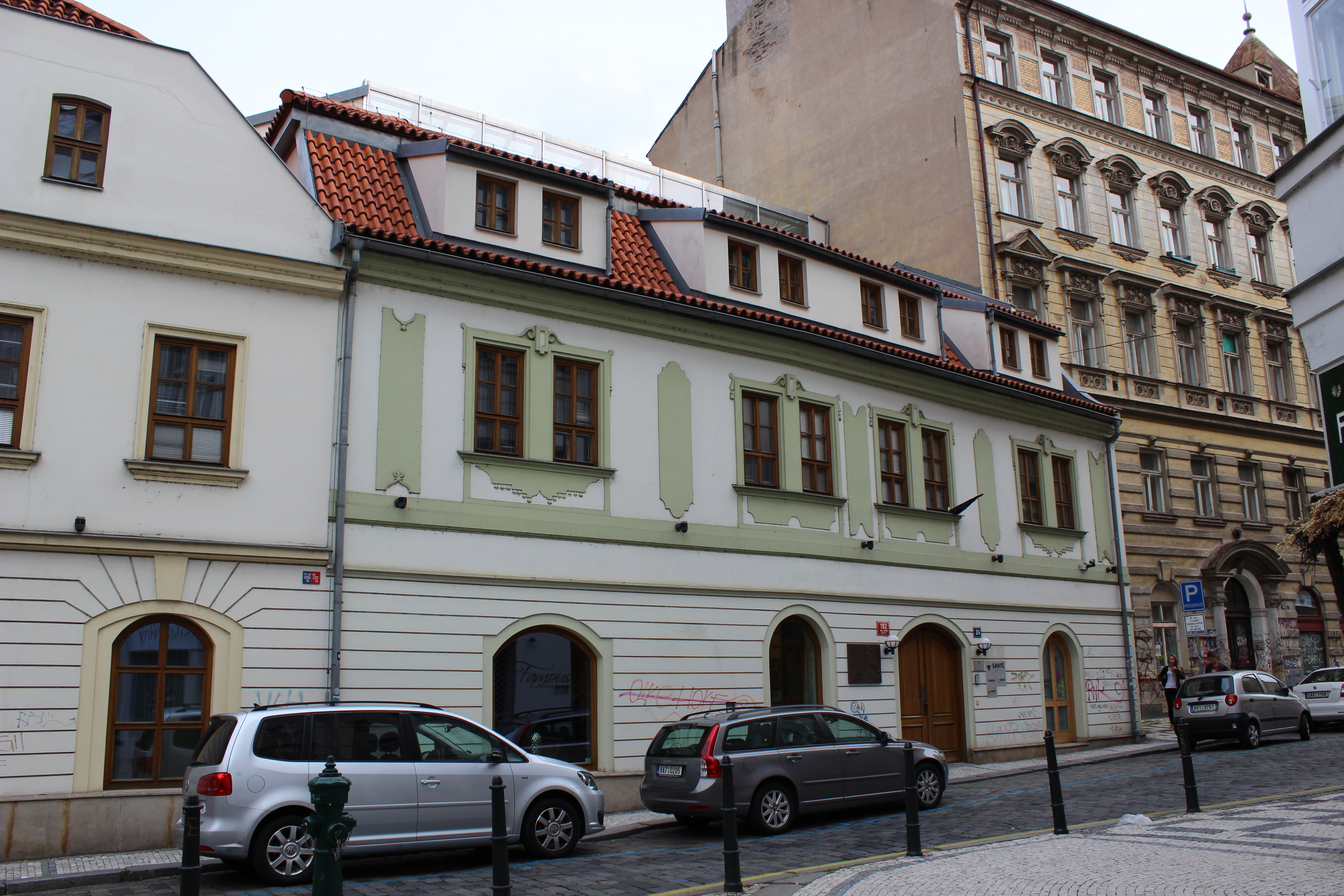 Dům v pražské Pštrossově ulici číslo 194/28, v němž bývala restaurace U Herclíků, ve které byli 13. března 1950 zatčení českoslovenští hokejisté.